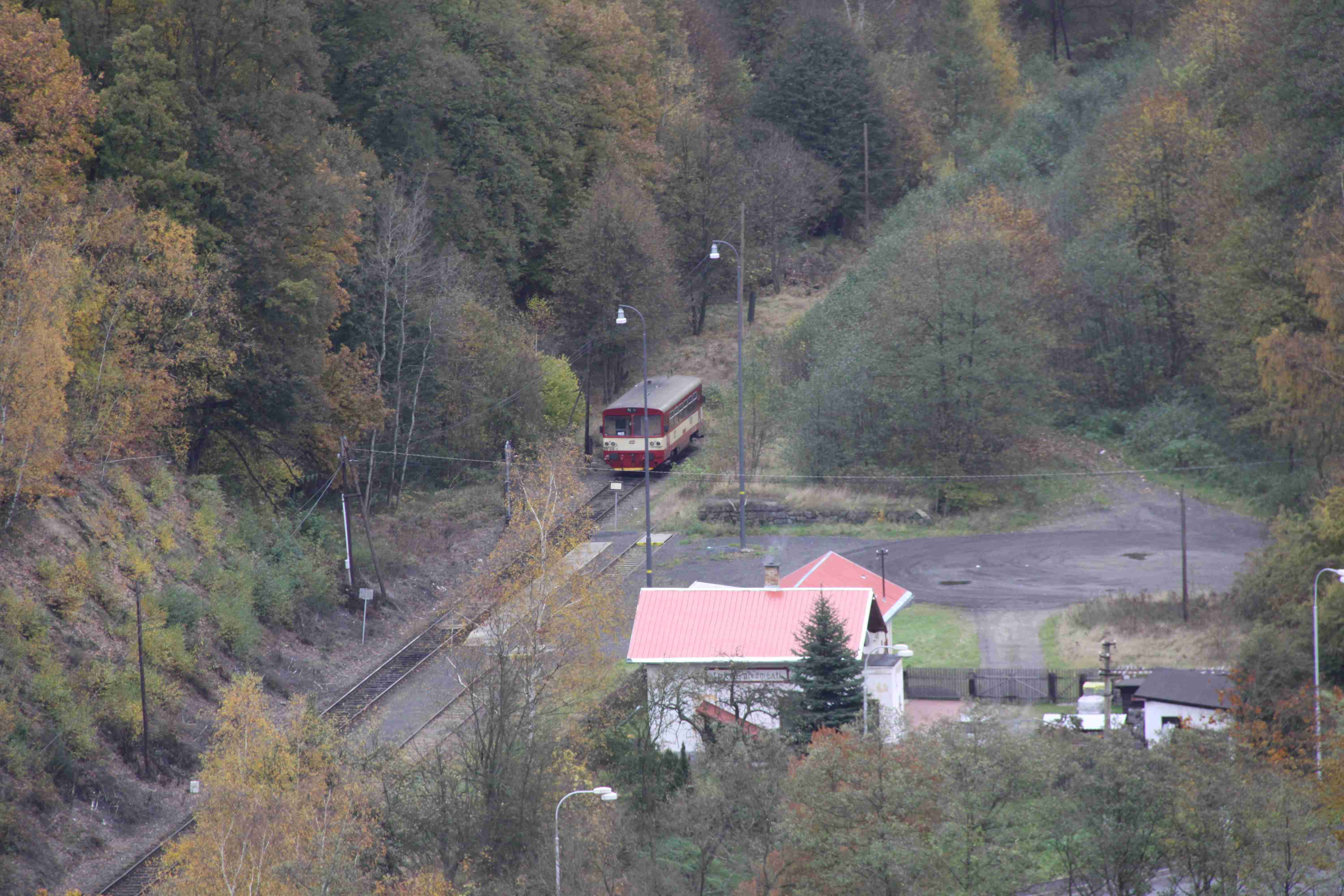 Streckenende bei Loket předměstí